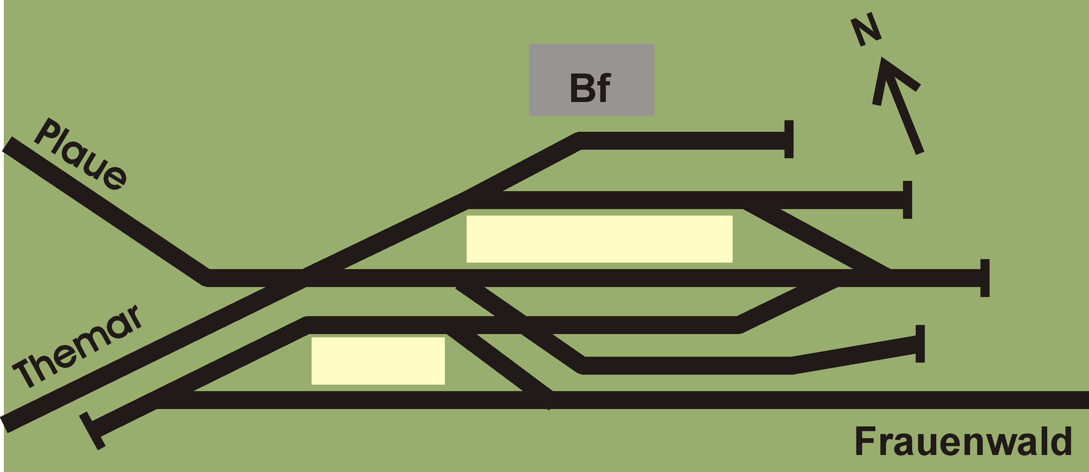 Gleisplanschema Bf. Rennsteig, Diese Skizze zeigt schematisiert die Lage der Gleise im Bahnhof Rennsteig im Jahr 1944.